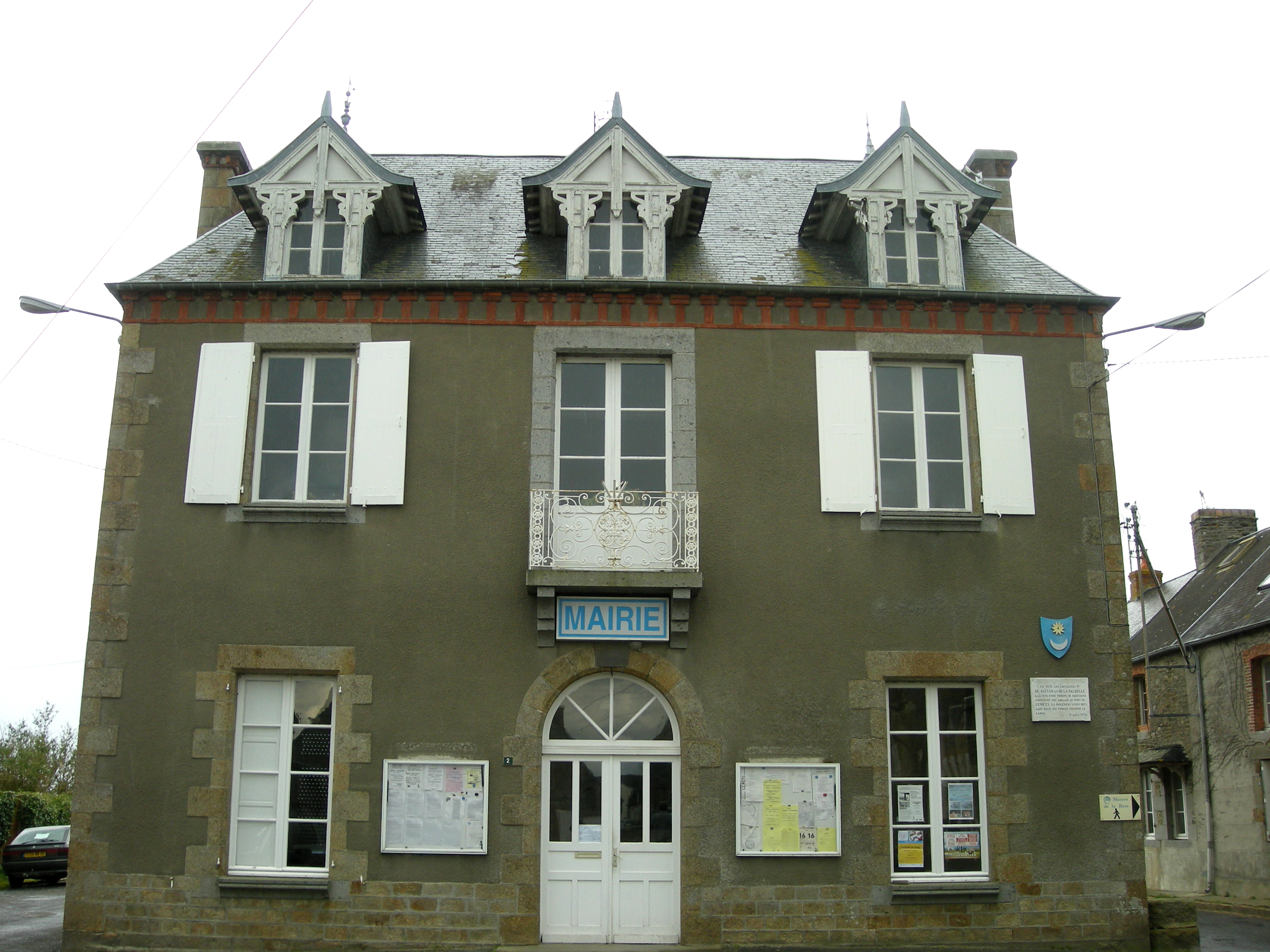 Mairie de Genêts (Manche, Normandie)